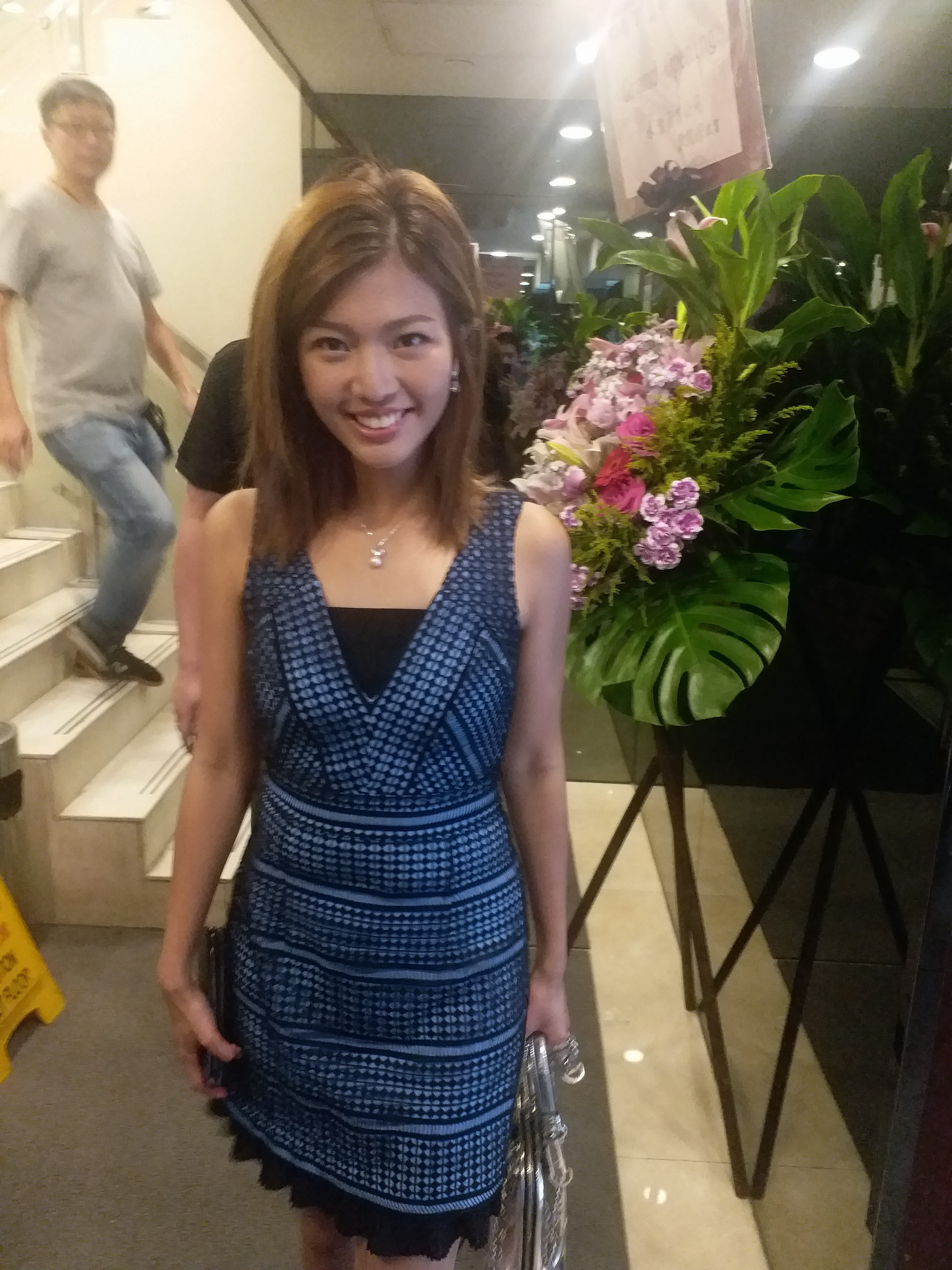 2019年7月28日 (健身中心「FIT24」灣仔店開幕儀式)